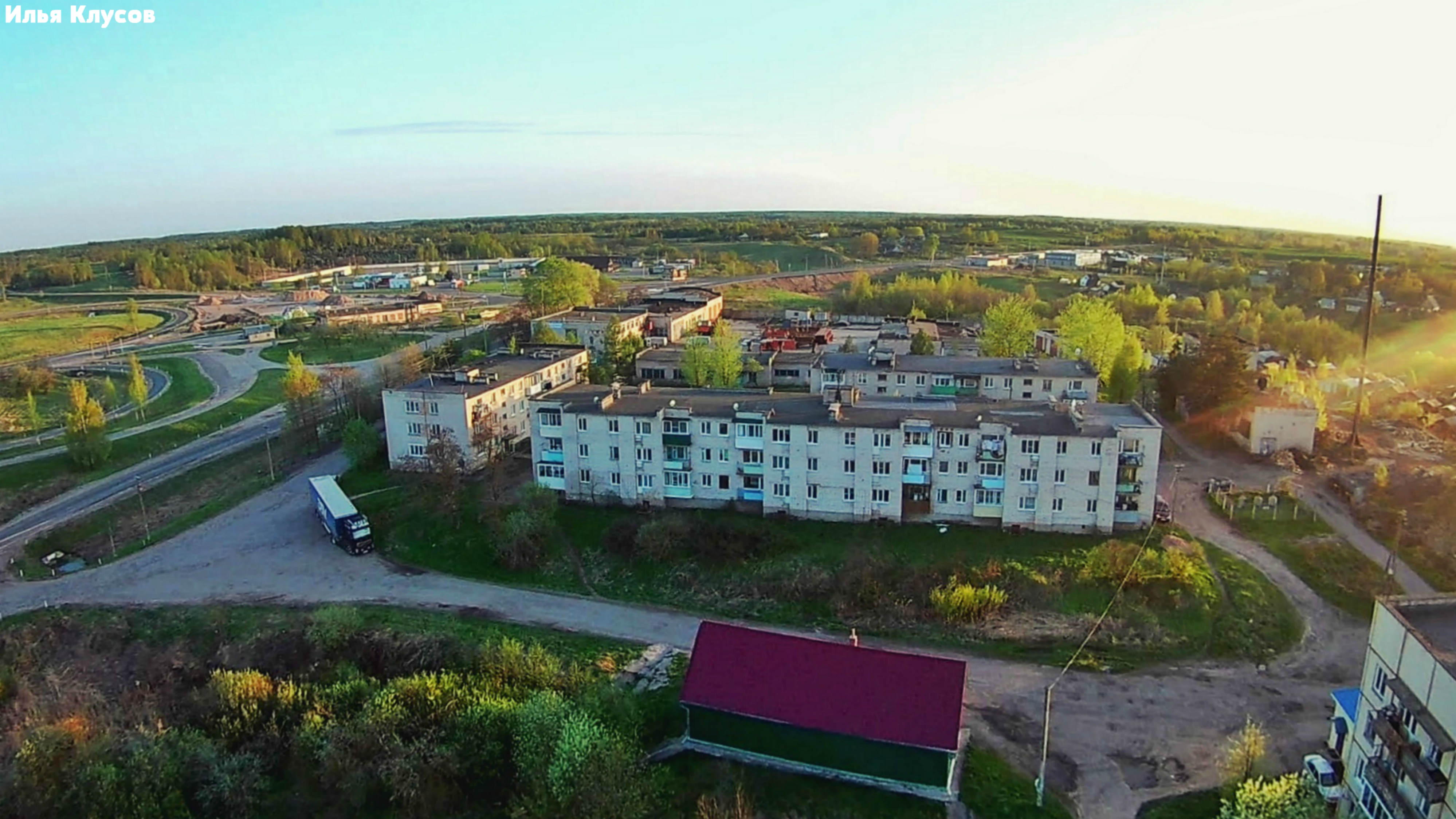 Вид на дом 7 и кооператор